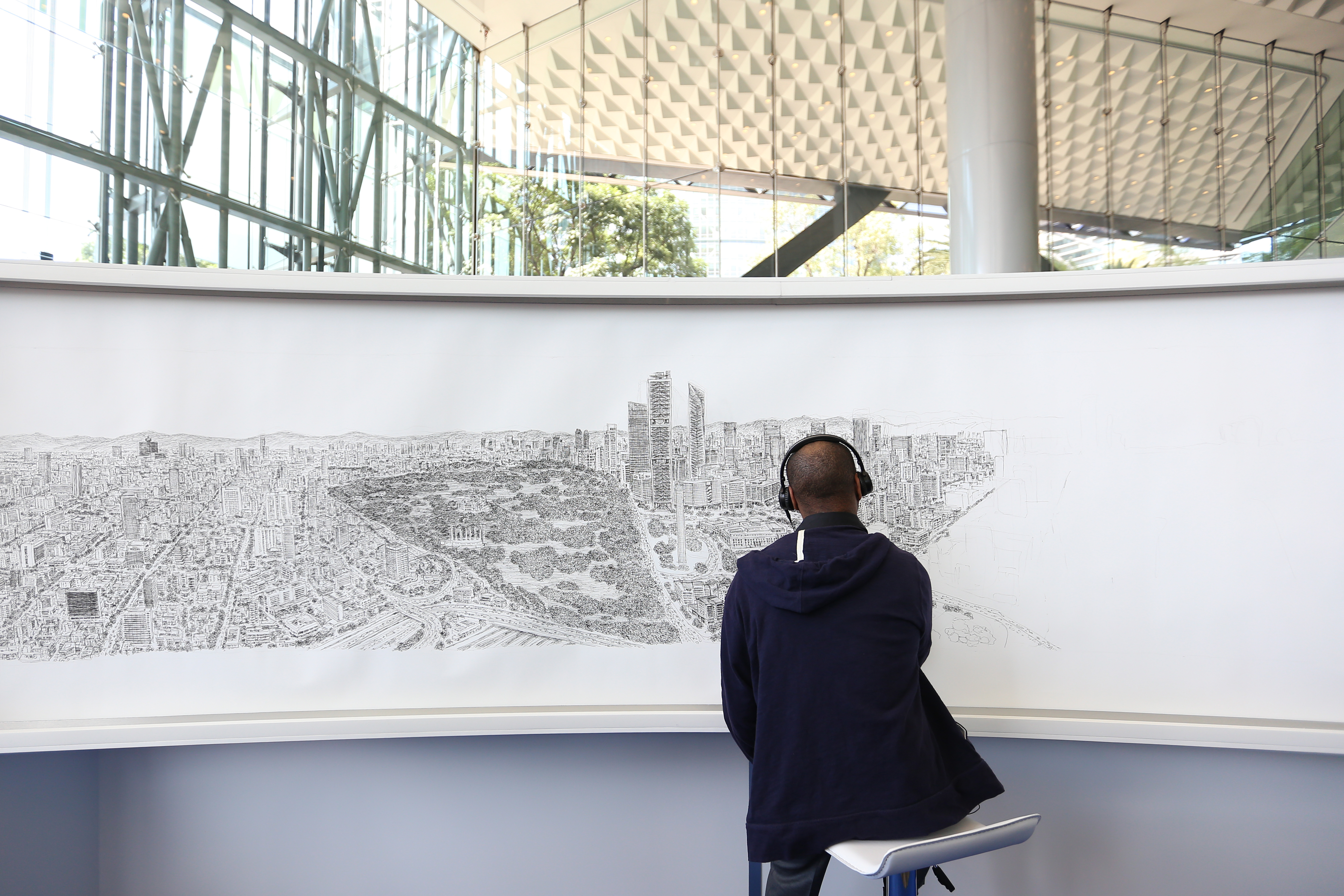 Stephen Wiltshire dibujando un paisaje de la Ciudad de México